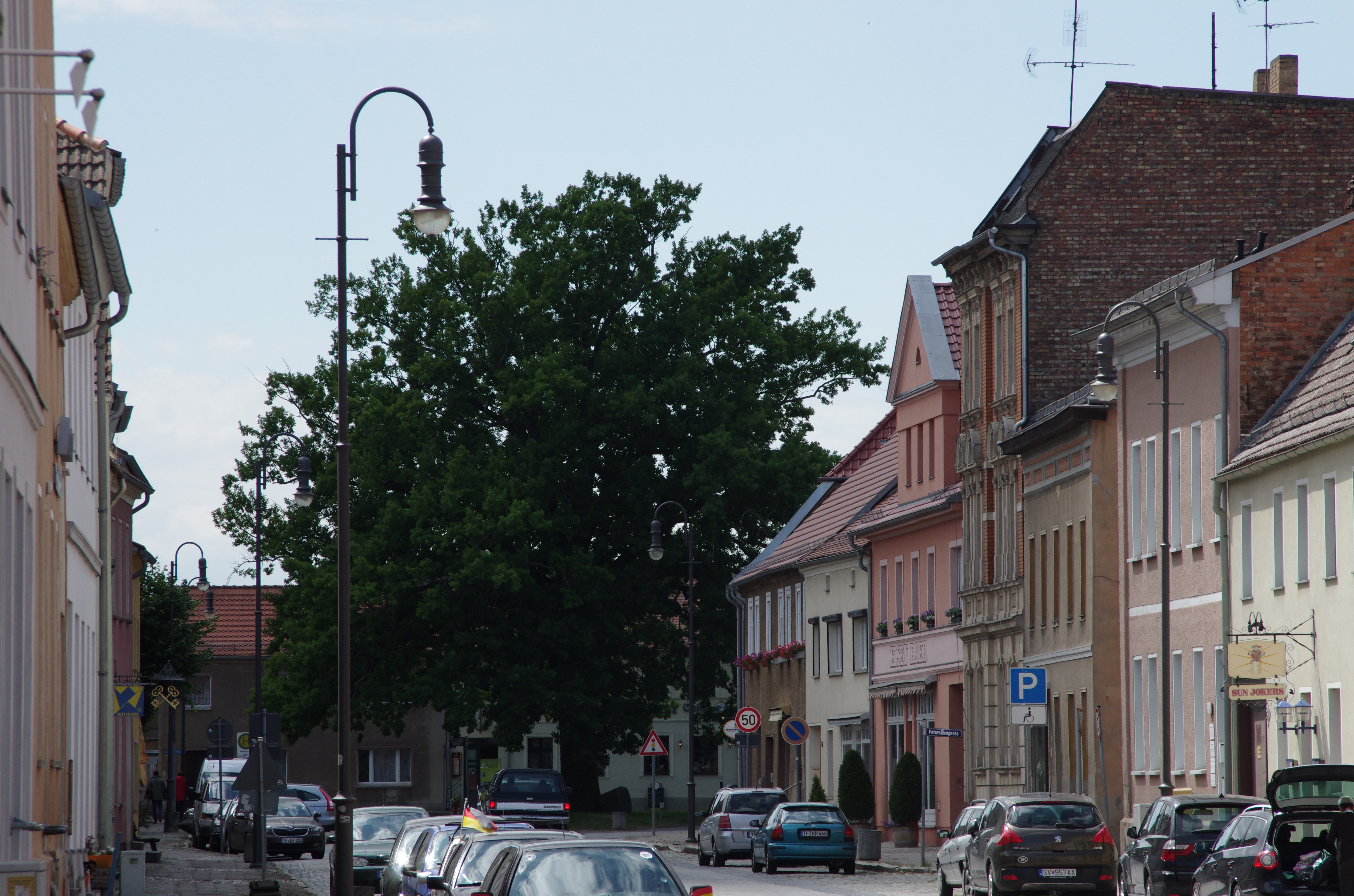 Jüterbog in Brandenburg. Der Baum am Heilig-Geist-Platz am Beginn der Pferdestraße steht unter Naturschutz.